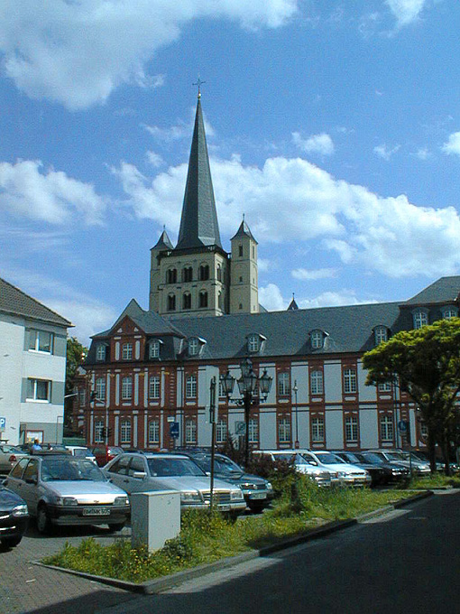 Abtei Brauweiler (in Pulheim)